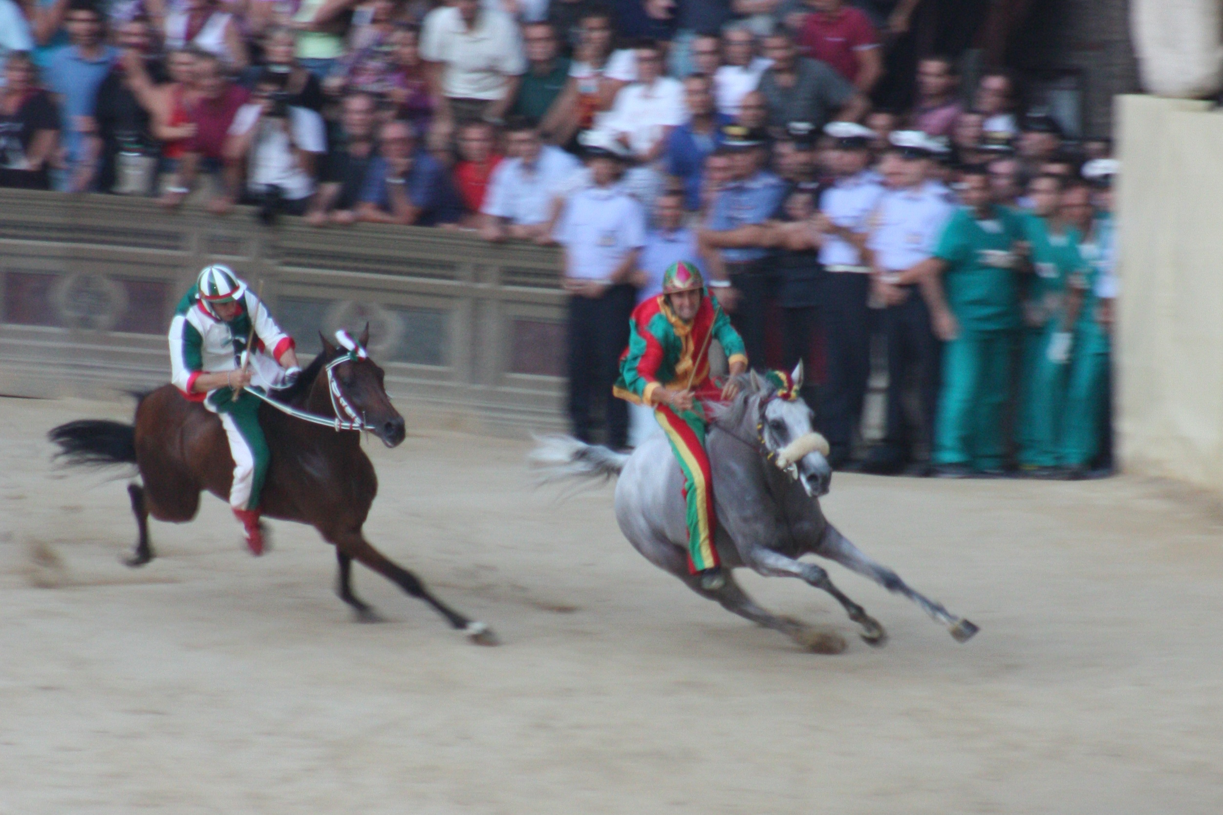 La corsa